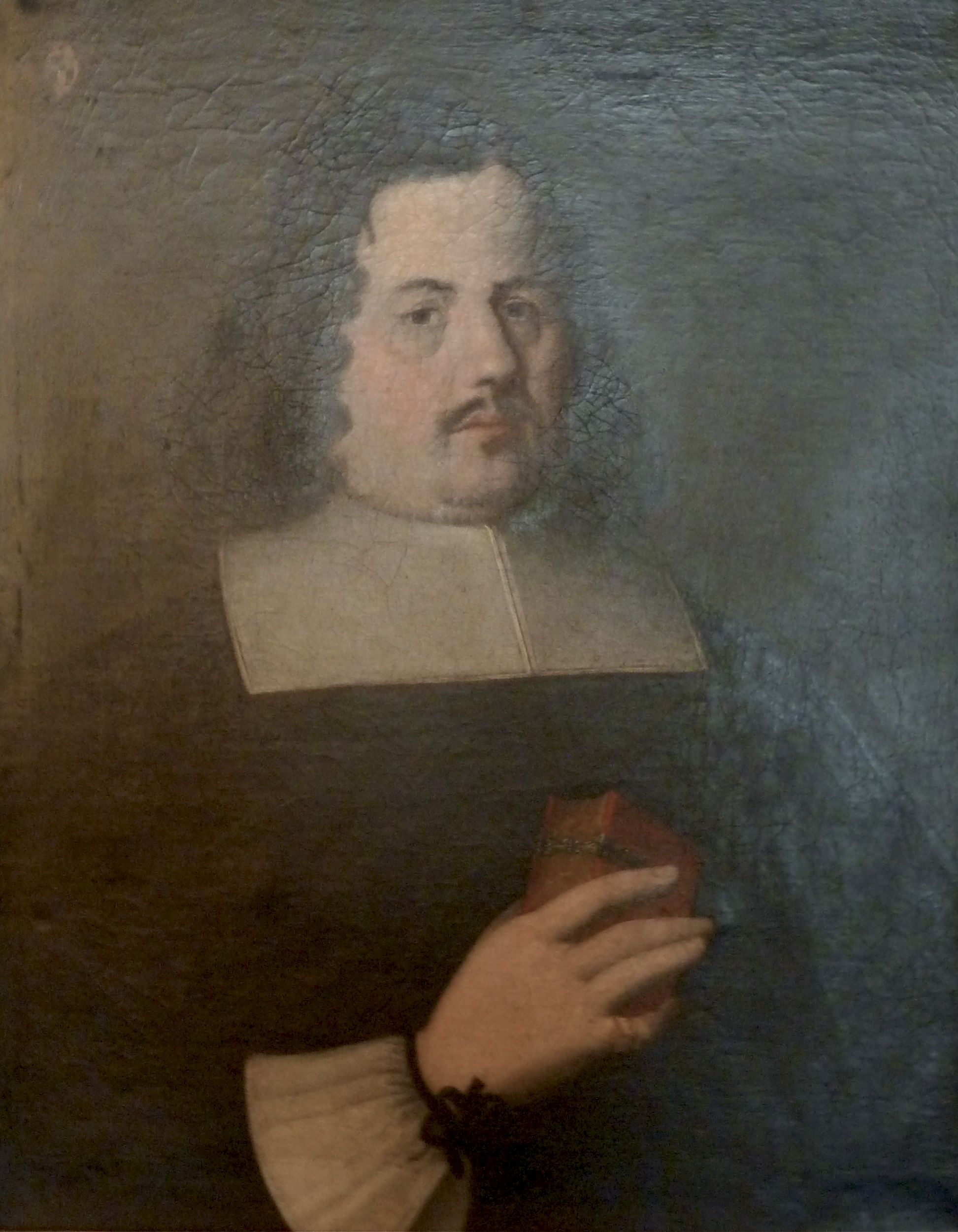 Mathias Schgier auf einem Bild im Cuort Ligia Grischa